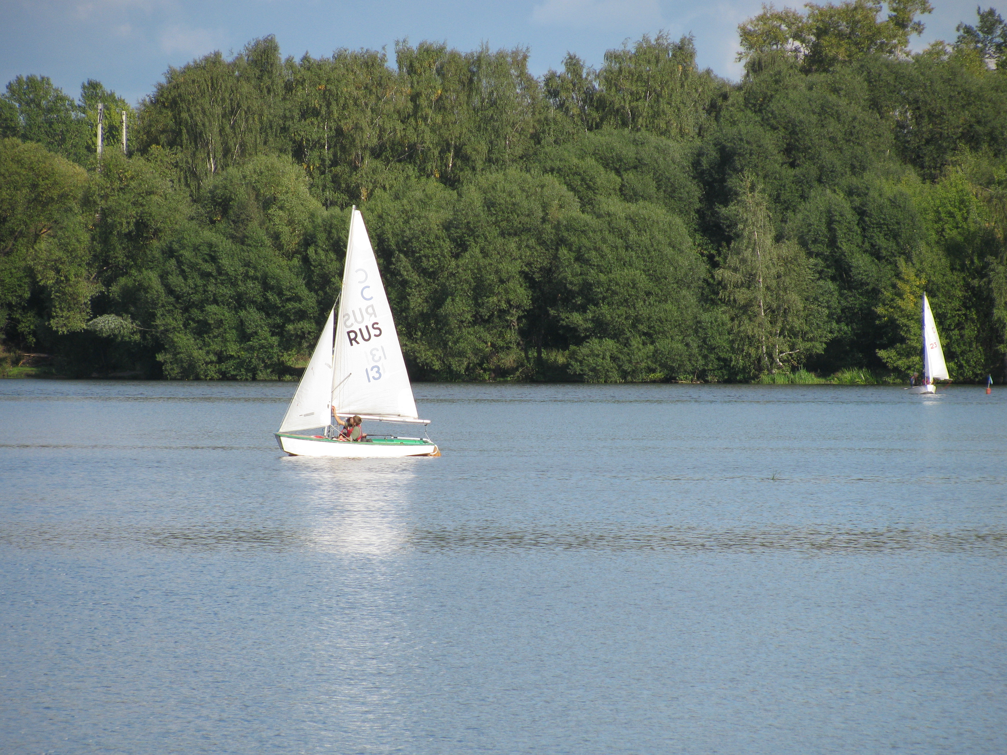 Dolgoprudny, Moscow Oblast, Russia